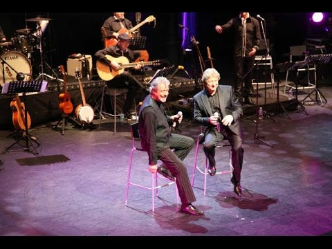 Les chanteurs Alain Turban et Gilles Dreu en concert à l'olympia